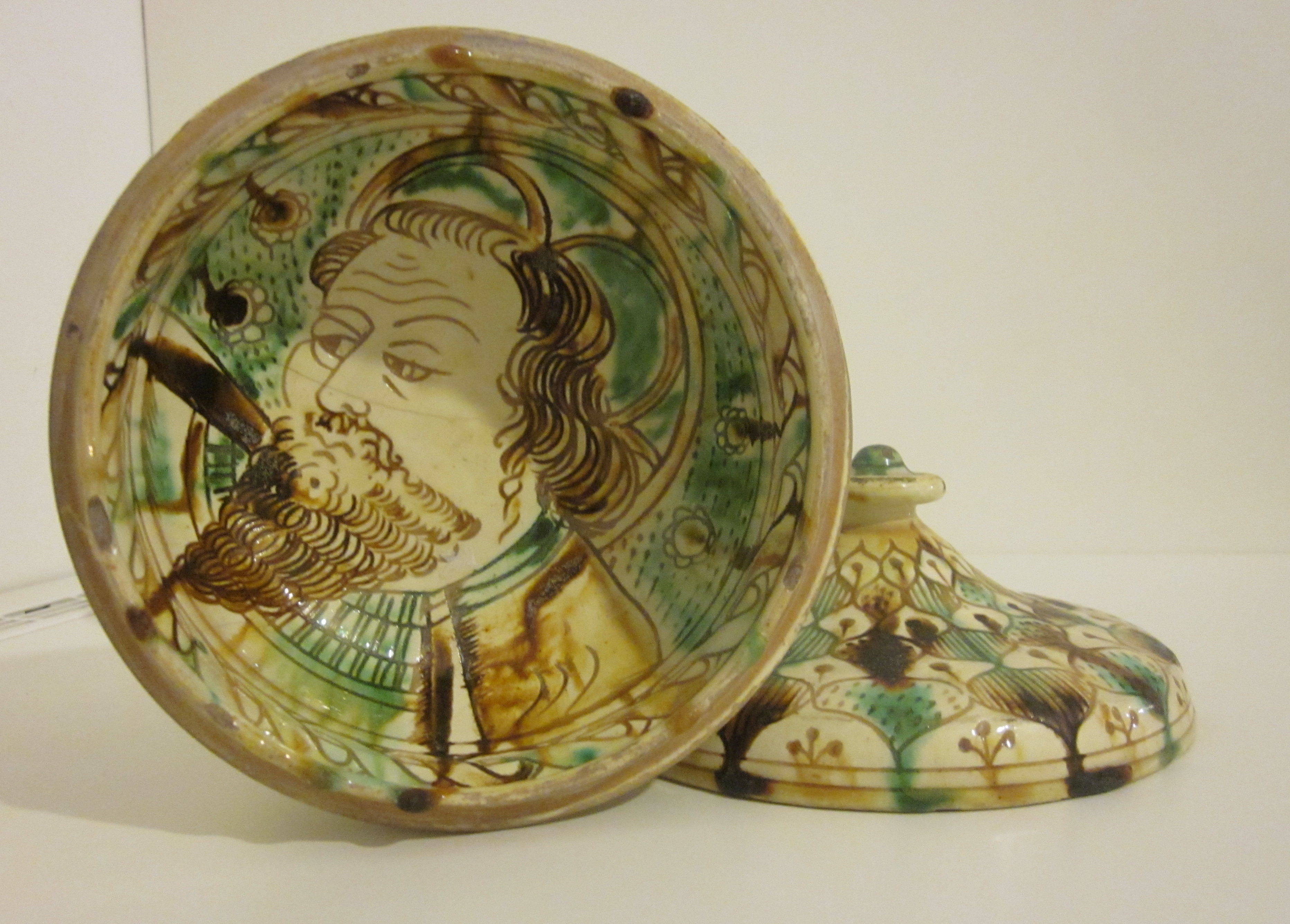 Calice con coperchio in ceramica ingobbiata graffita, attribuita alla ditta Carlo e Giano Loretz di Milano [1896-1906]. Esposta al museo